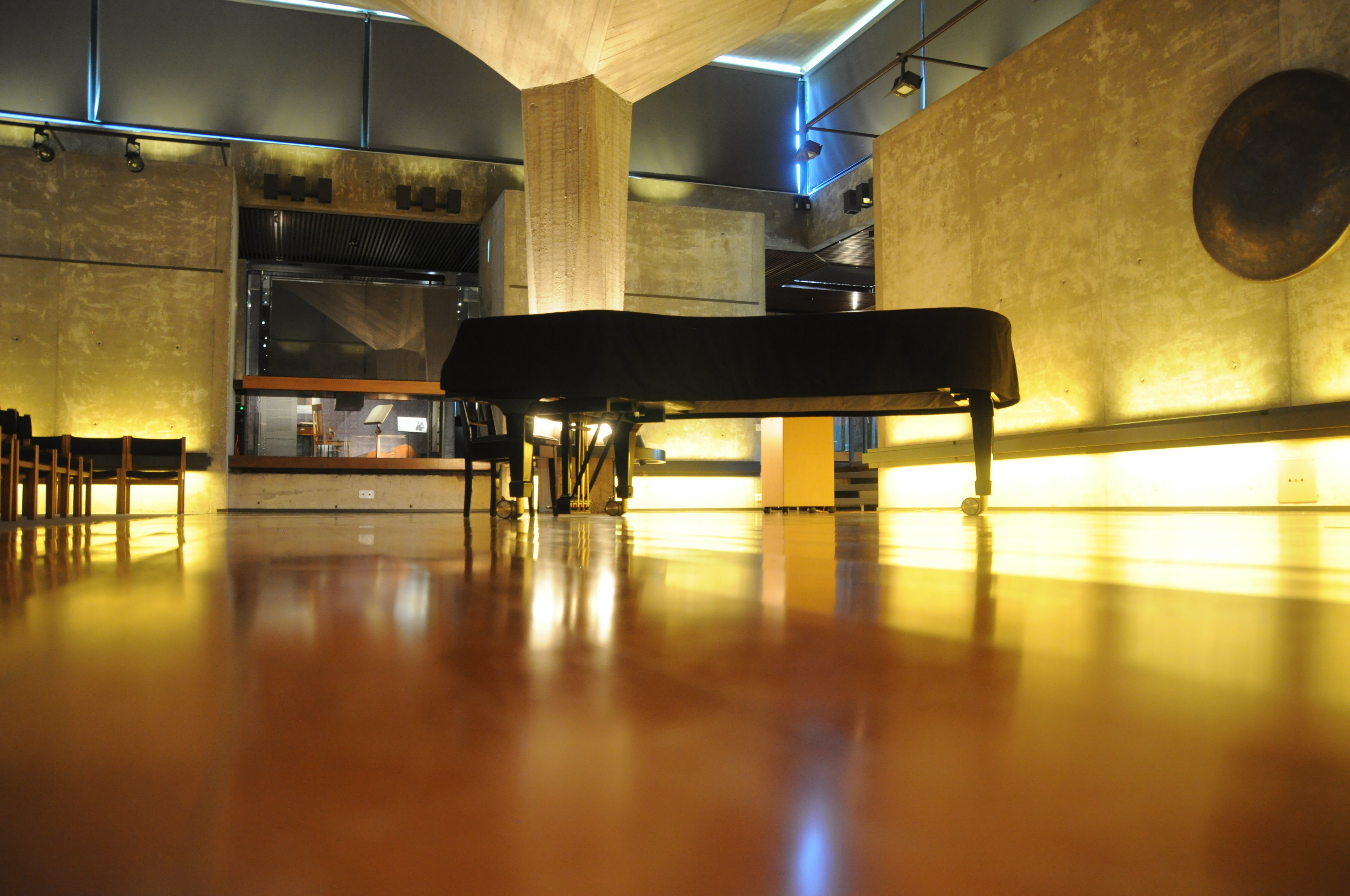 Sibelius-museon flyygeli museon konserttisalissa